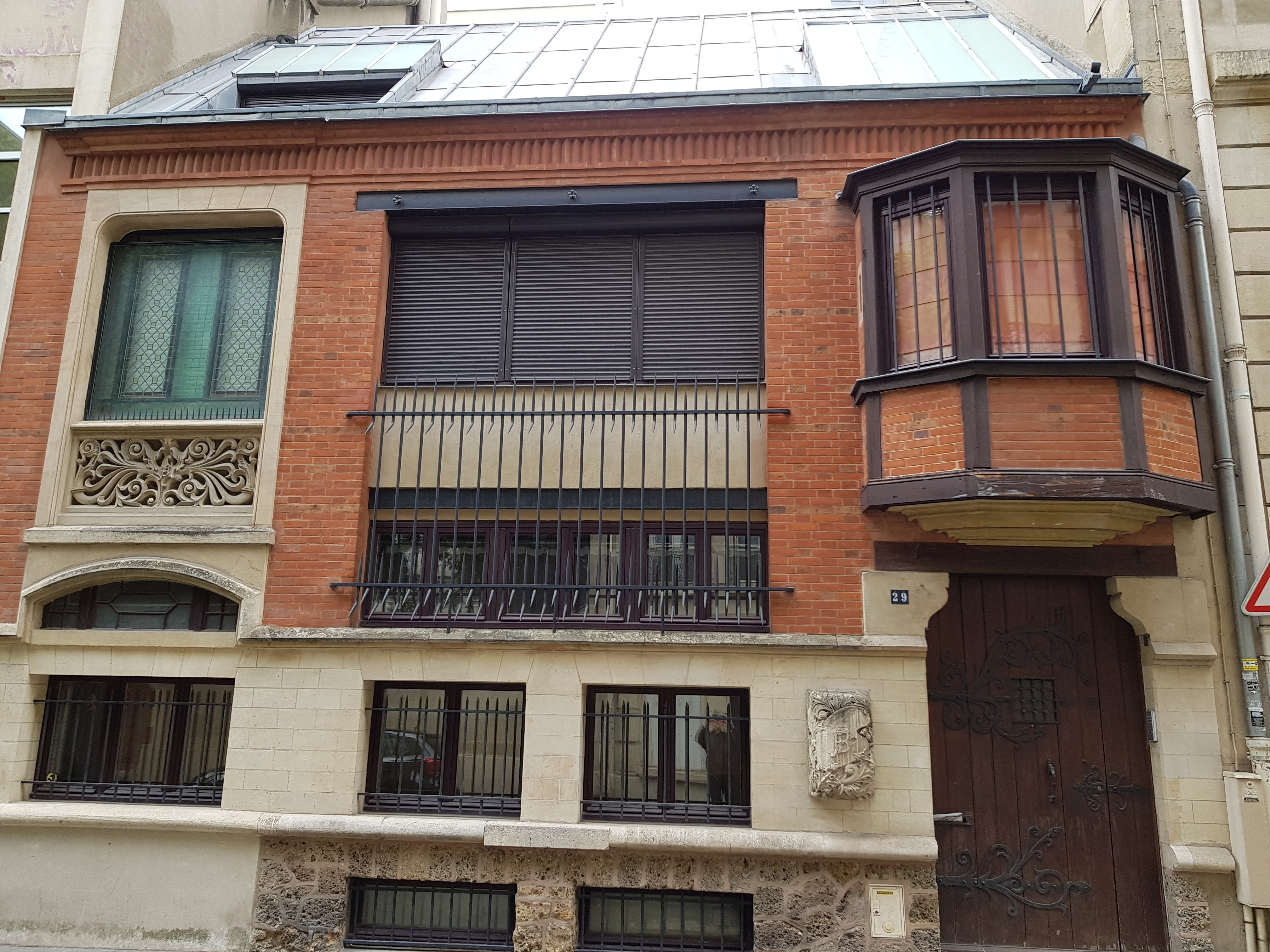 29, rue Daubigny, Paris 17e.